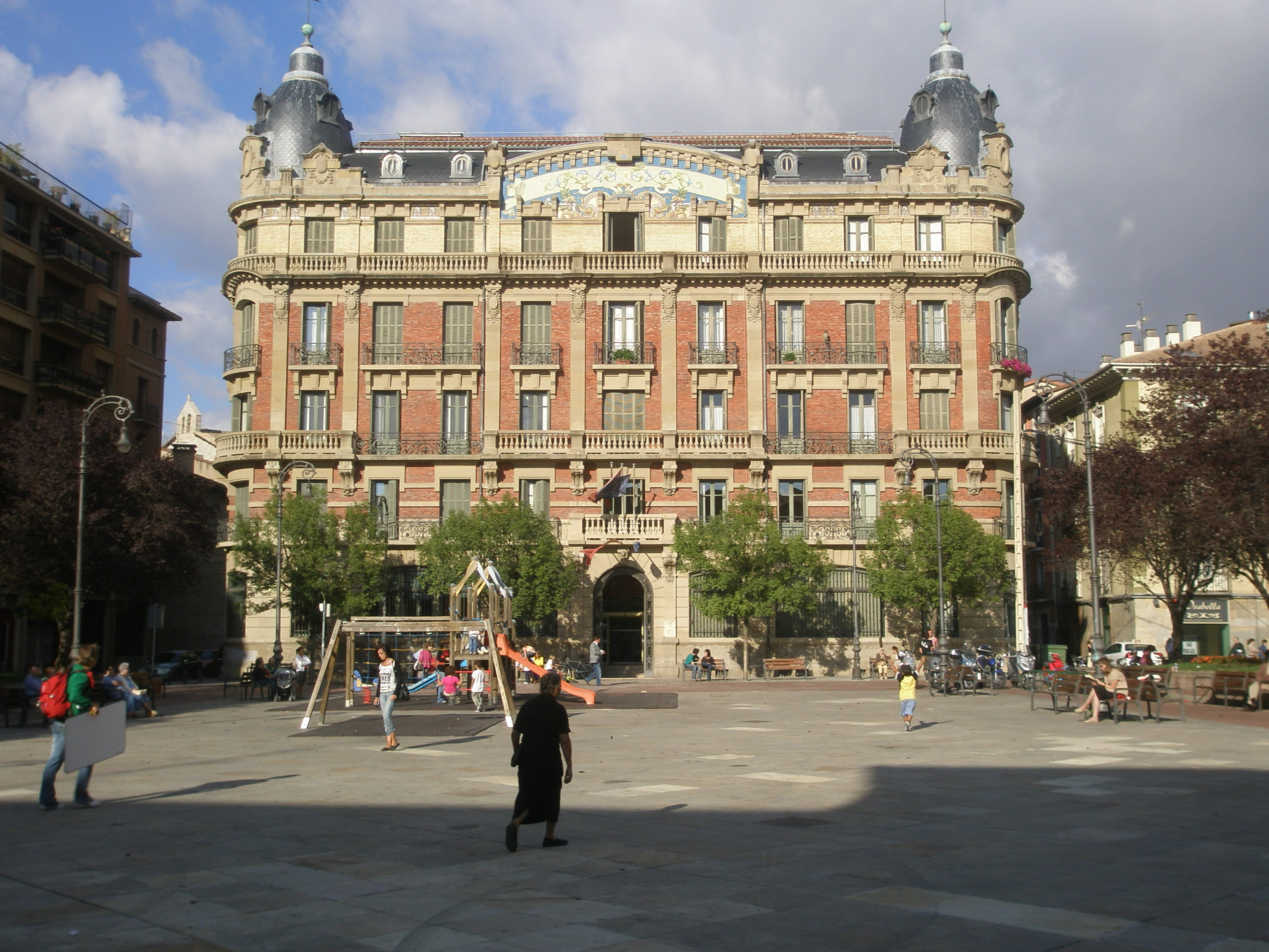 Edificio pamplonés de 1914